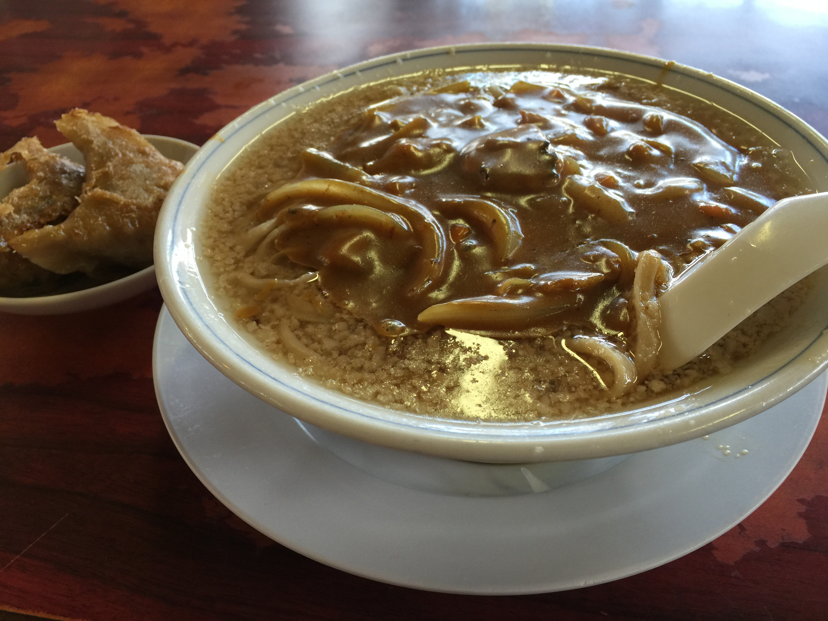 杭州飯店のカレー中華。杭州飯店で提供されるカレー中華は燕背脂ラーメンと三条カレーラーメンのあいの子。